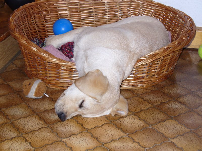 Lucy im Körbchen